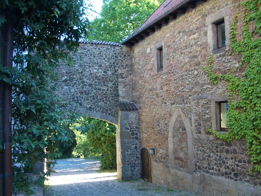 Zugemauerter Spitzbogen. Foto: Burg Fürsteneck